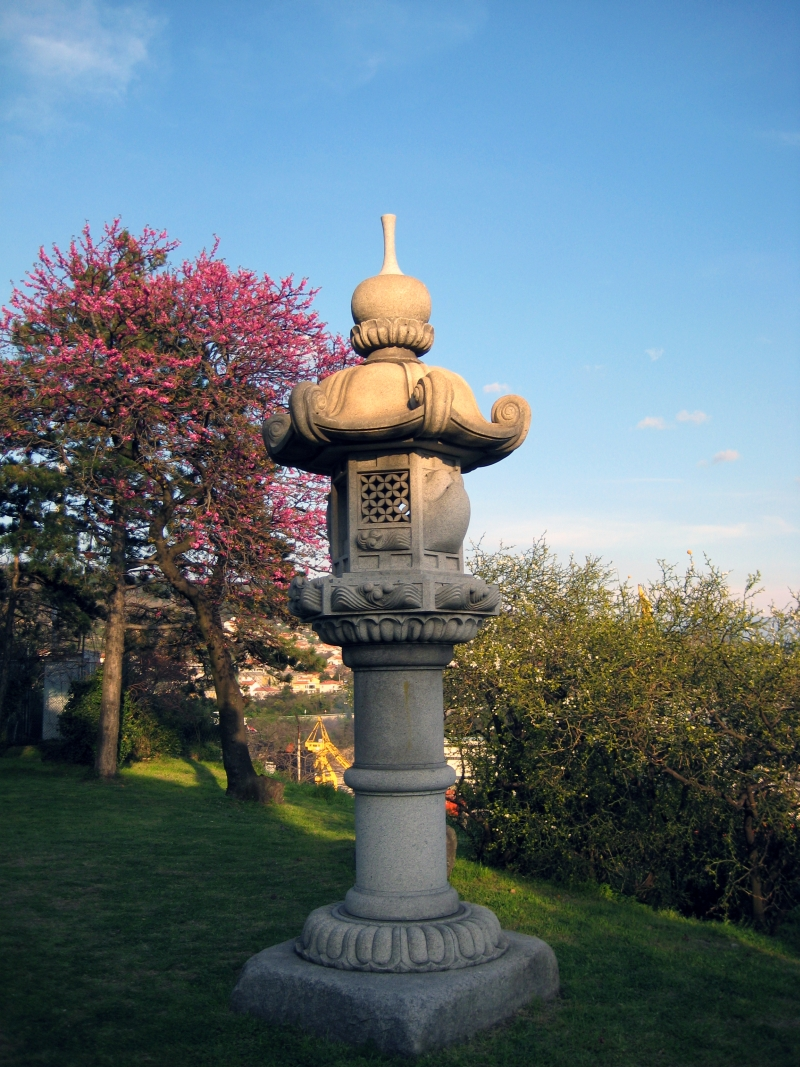 Lanterna, poklon grada Kawasakija Rijeci